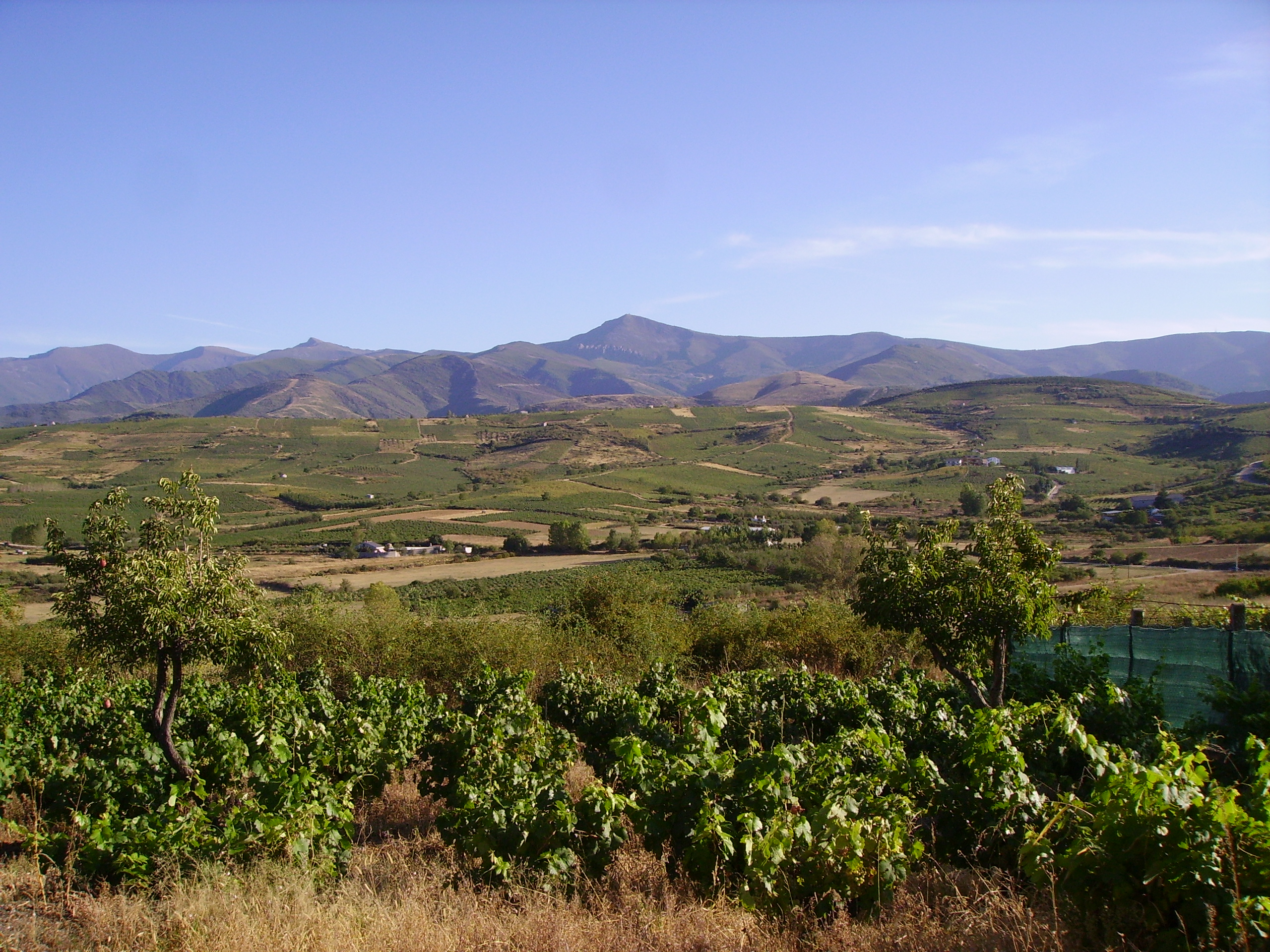 Los montes Aquilanos desde San Lorenzo del Bierzo.